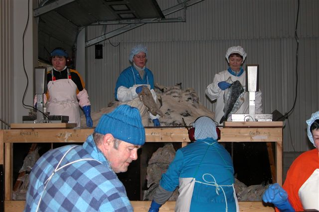 Fiskefabrik i Vágur